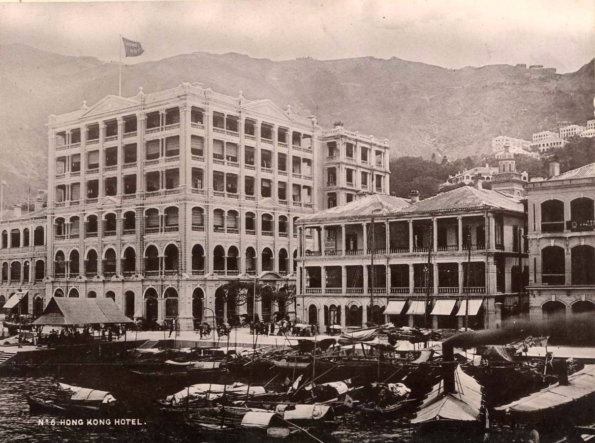 Hong Kong Hotel